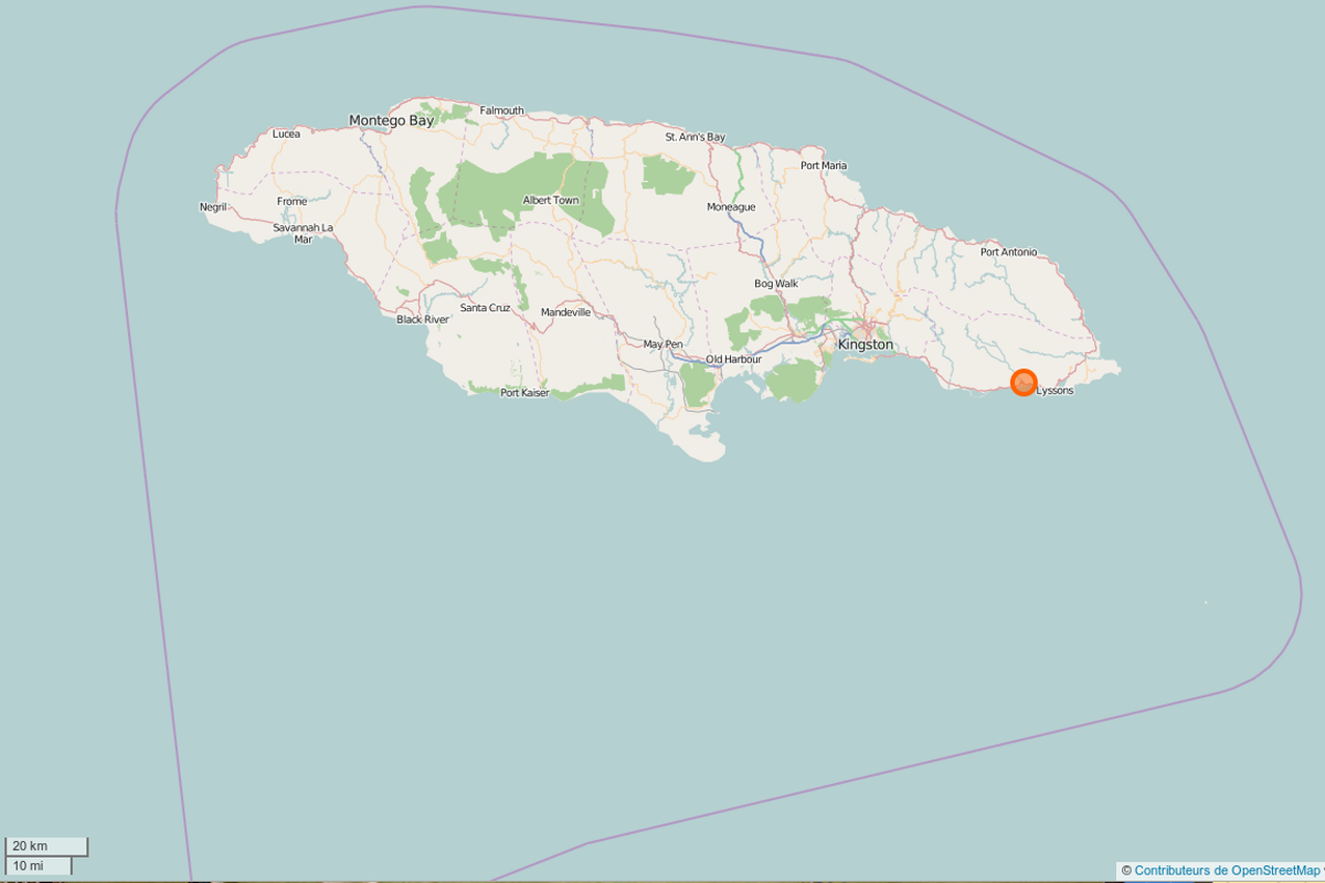 Capture d'écran de OpenStreetMap : Morant Bay, Jamaïque, URI geo:17.7552,-77.5182?z=9